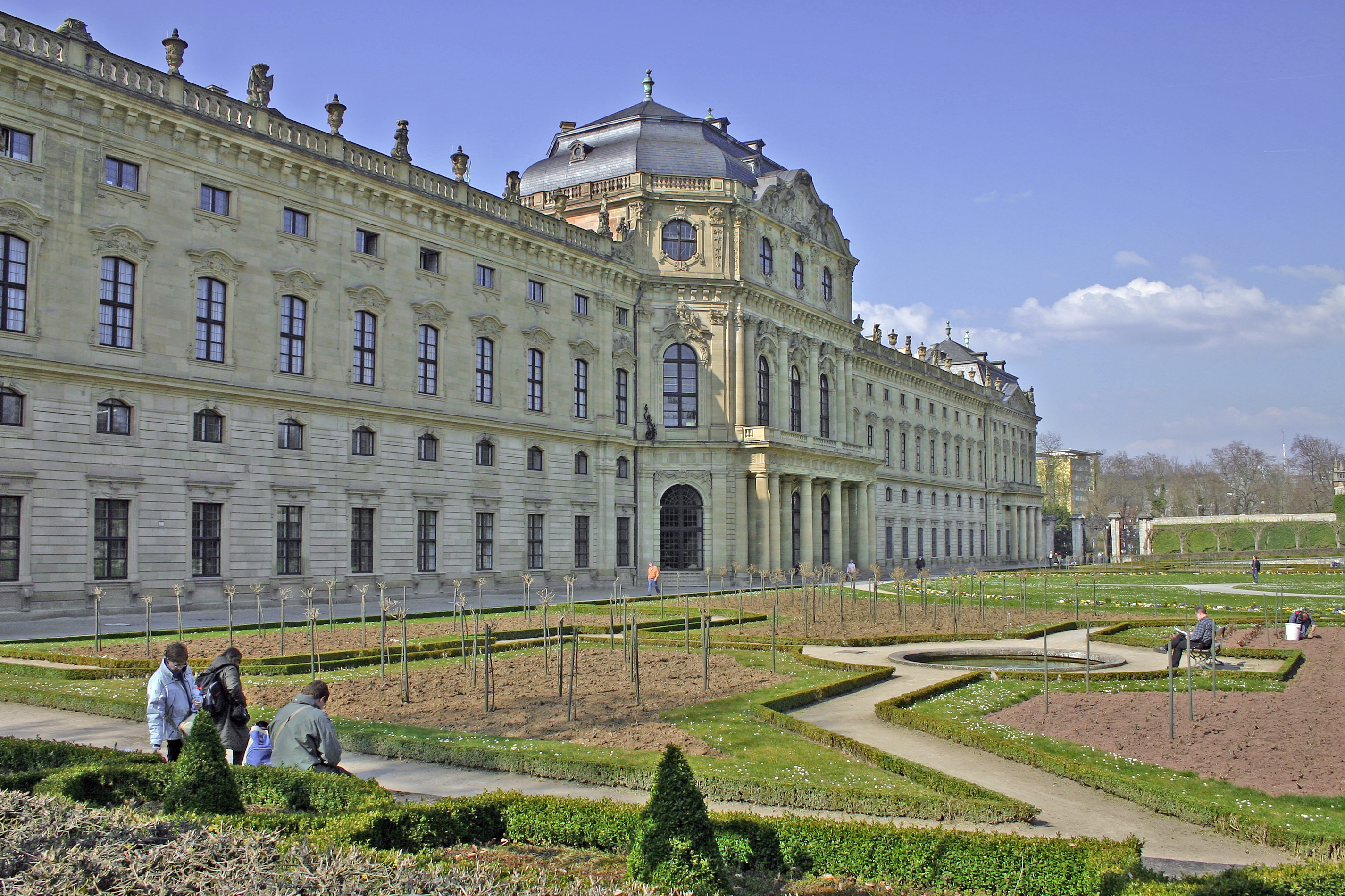 Würzburger Residenz, Ansicht Hofgarten